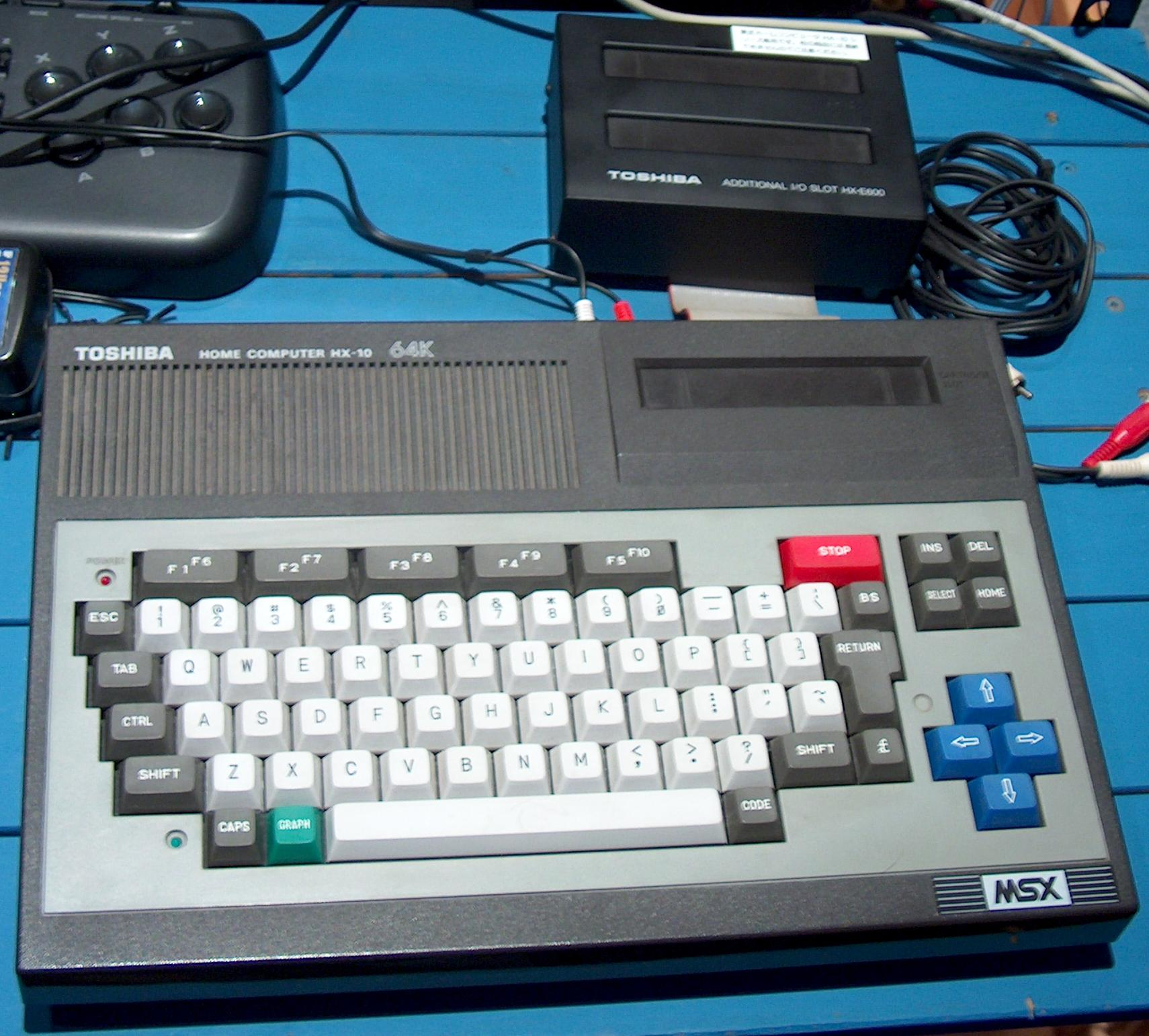 Ordenador doméstico Toshiba HX-10 MSX-1 con expansor de slots Toshiba HX-E600, propiedad de Fernando Lopez Ostenero